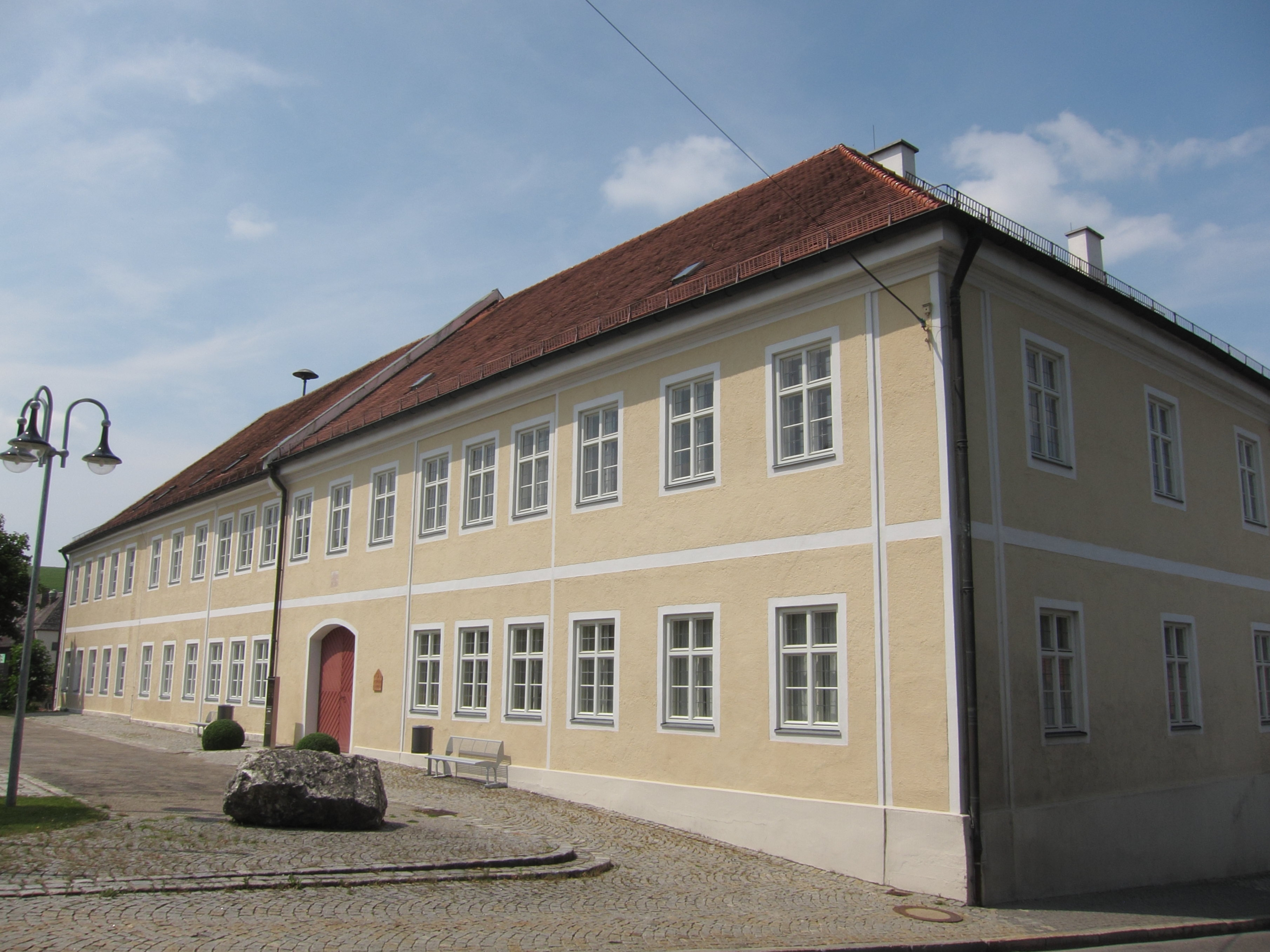 Hauptstraße 9–11; Pfarrhaus und Gemeindeamt, ehemaliger Propst- und Dechanthof, später Pfarrhaus mit angebauter Schule (jetzt Rathaus), zweigeschossiger Walmdachbau von Johann Baptist Gunetzrhainer 1737 errichtet, umgebaut erste Hälfte 19. Jahrhundert.